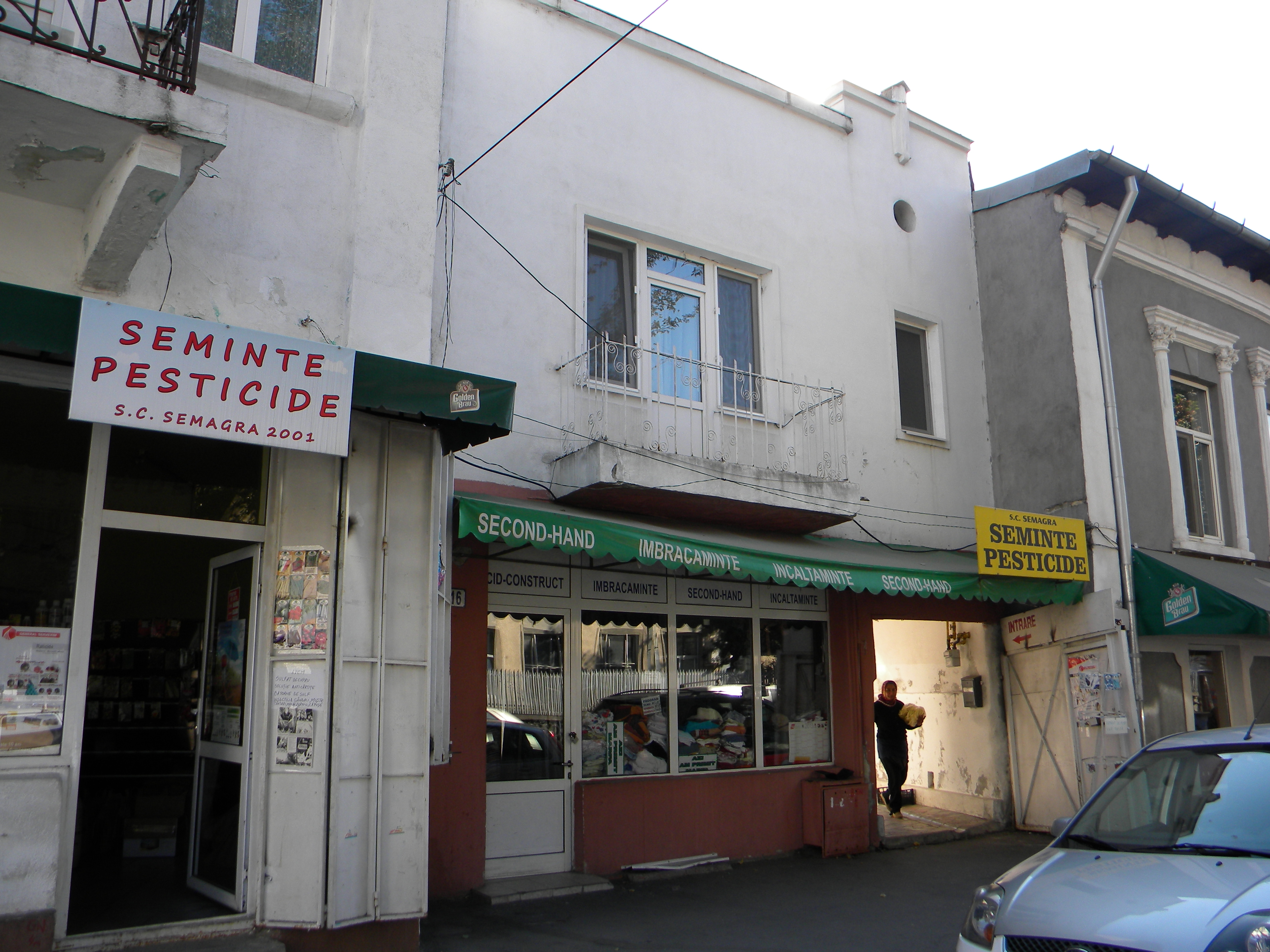 Bucuresti, Romania, Str. Atelierului nr. 16, sect. 1; B-II-m-B-18008